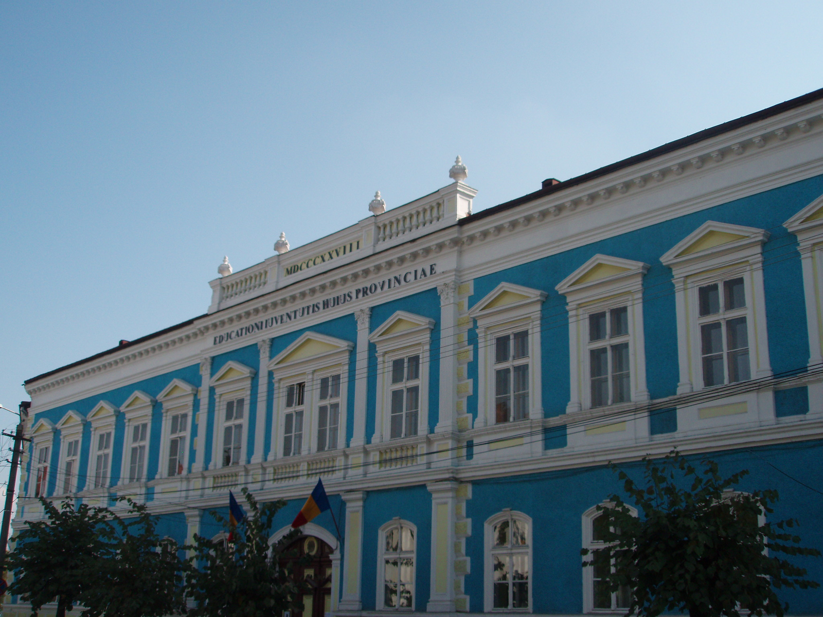 Poză cu fațada Colegiului Național Samuil Vulcan